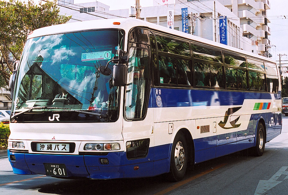 沖縄バス JRカラー 三菱ふそうエアロバス